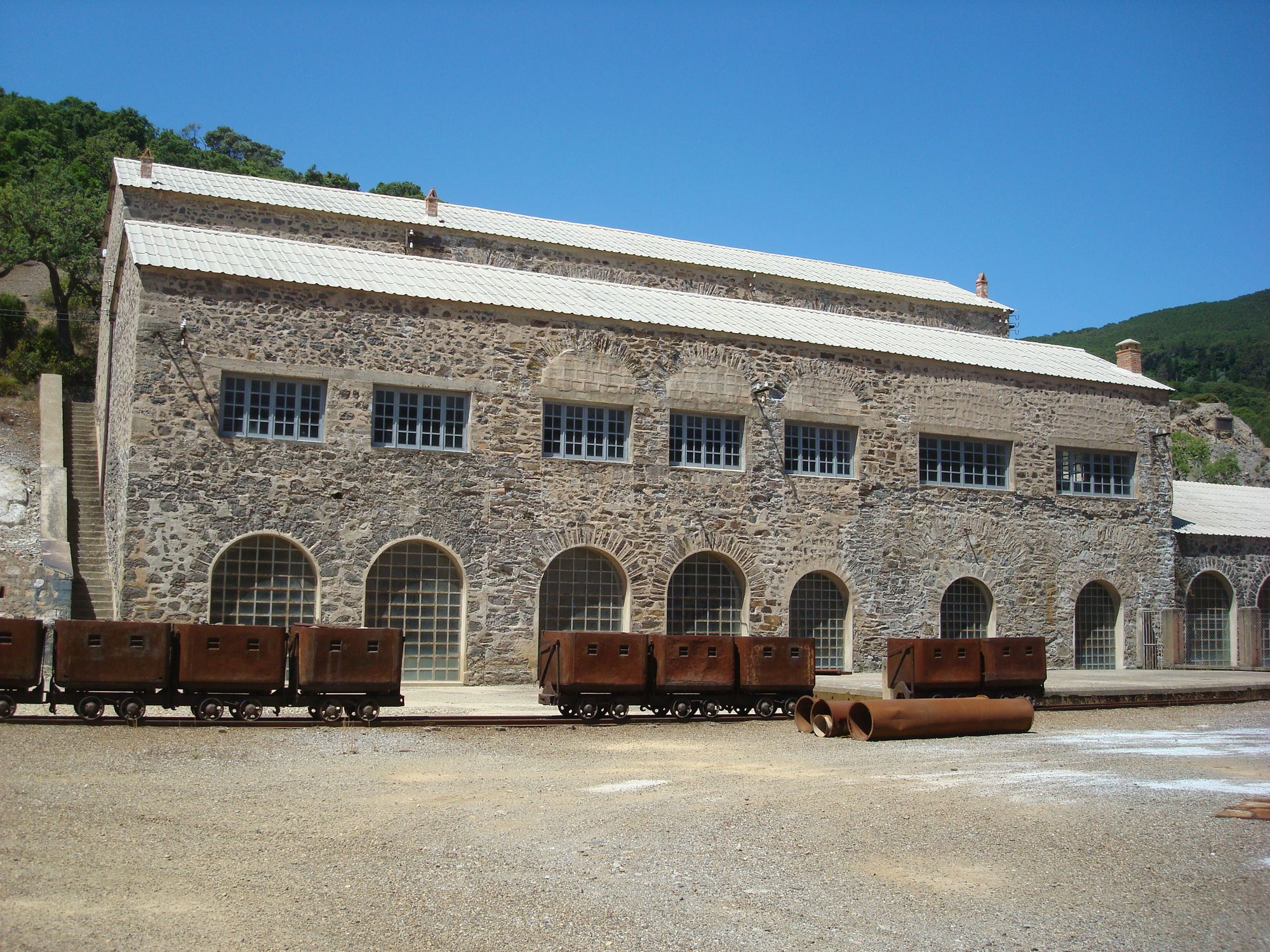 Edificio nato come Laveria Piccalinna, realizzato nel 1876 nell'omonimo cantiere.